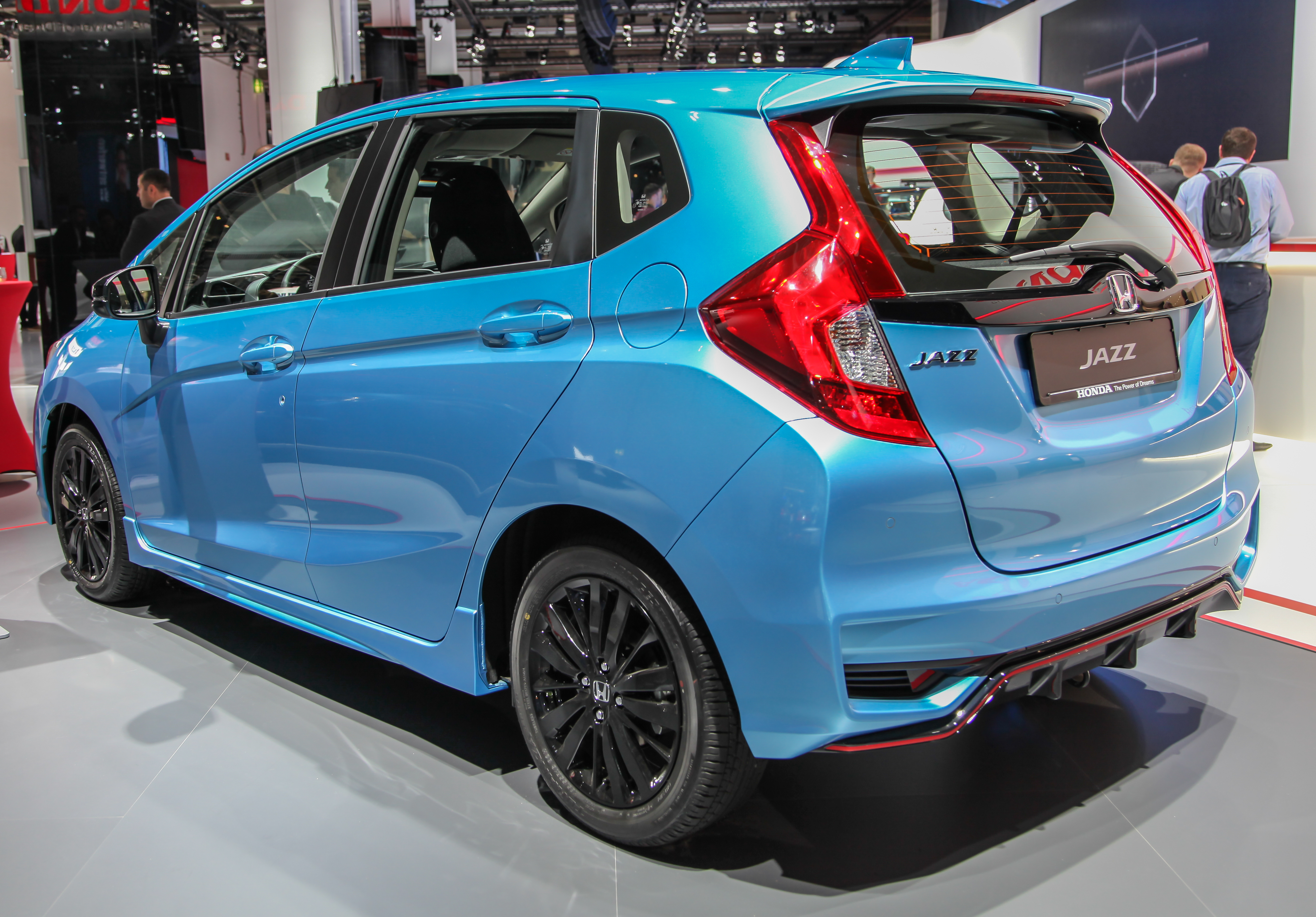 Honda Jazz Facelift, IAA 2017